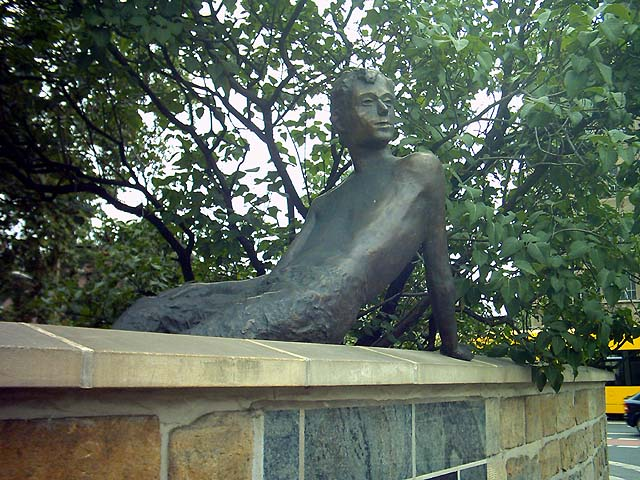 Dresden (Sachsen): Bronzeplastik auf der Mauer des Anwesens des Erich-Kästner-Museums am Albertplatz